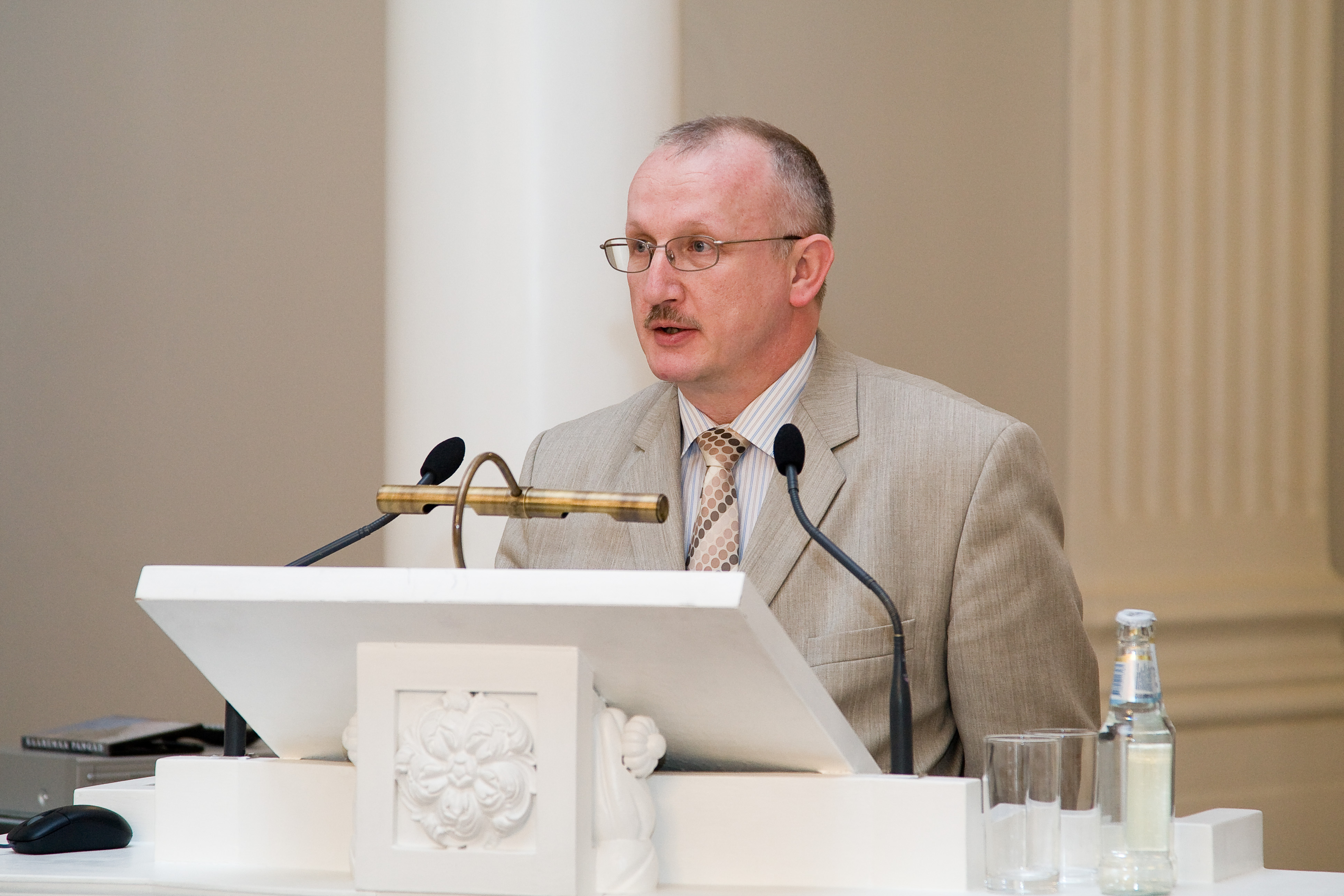 TÜ loodus- ja tehnoloogiateaduskonna paleontoloogia ja stratigraafia professor Tõnu Meidla esinemas avasõnadega UNESCO Rahvusvahelise Planeet Maa Aasta Eesti avaüritusel Tartu Ülikooli aulas 18. märtsil 2008.